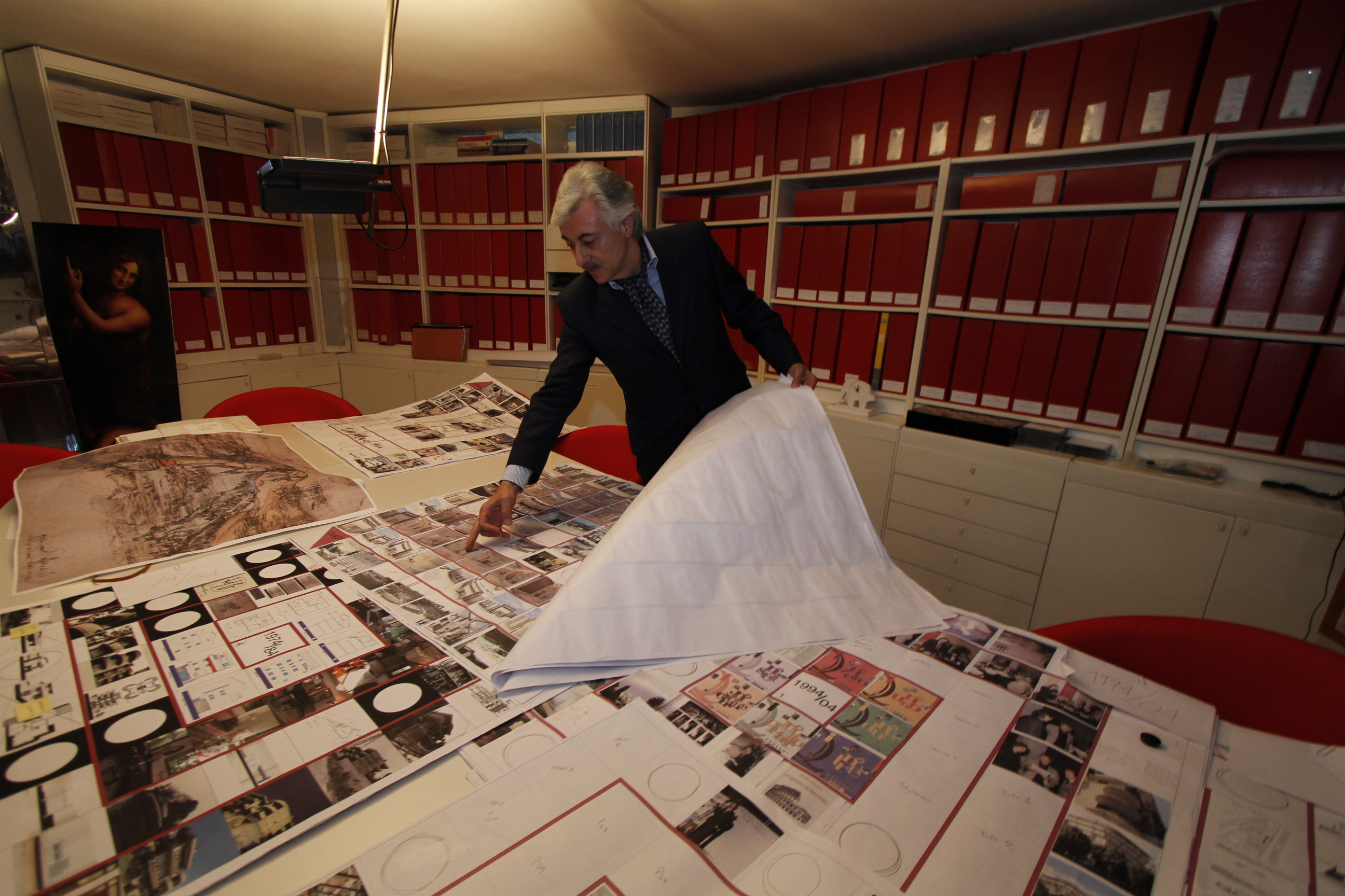 Oreste Ruggiero